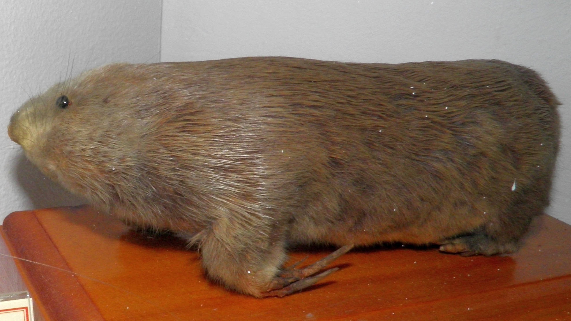 Забайкальский цокор или Северокитайский цокор (Myospalax psilurus)